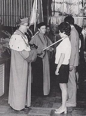 Pasowanie na studentów WSP w Opolu w 1970 r. przez rektora J. Seredykę. Indeksy wręcza dziekan H. Borek.